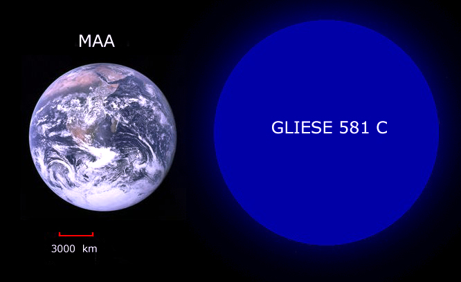 Eesti keelde tõlgitud versioon internetist leidud vabavaralisest pildist.